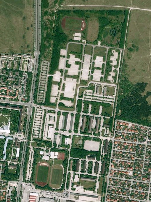 Luftaufnahme der Bayerischen Vermessungsverwaltung: Fürst-Wrede-Kaserne in München, Bayern.